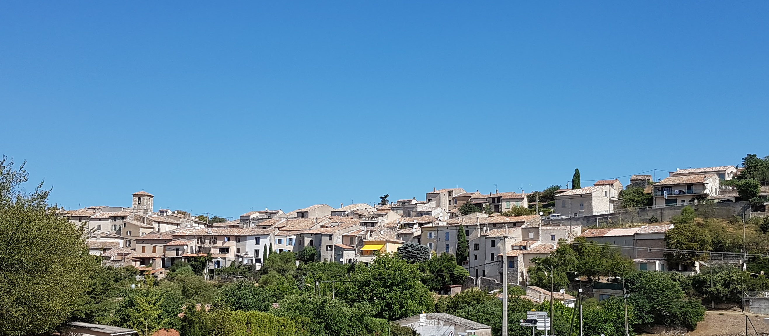 Vidaĵo de la vilaĝo Montagnac, venante de Montpezat